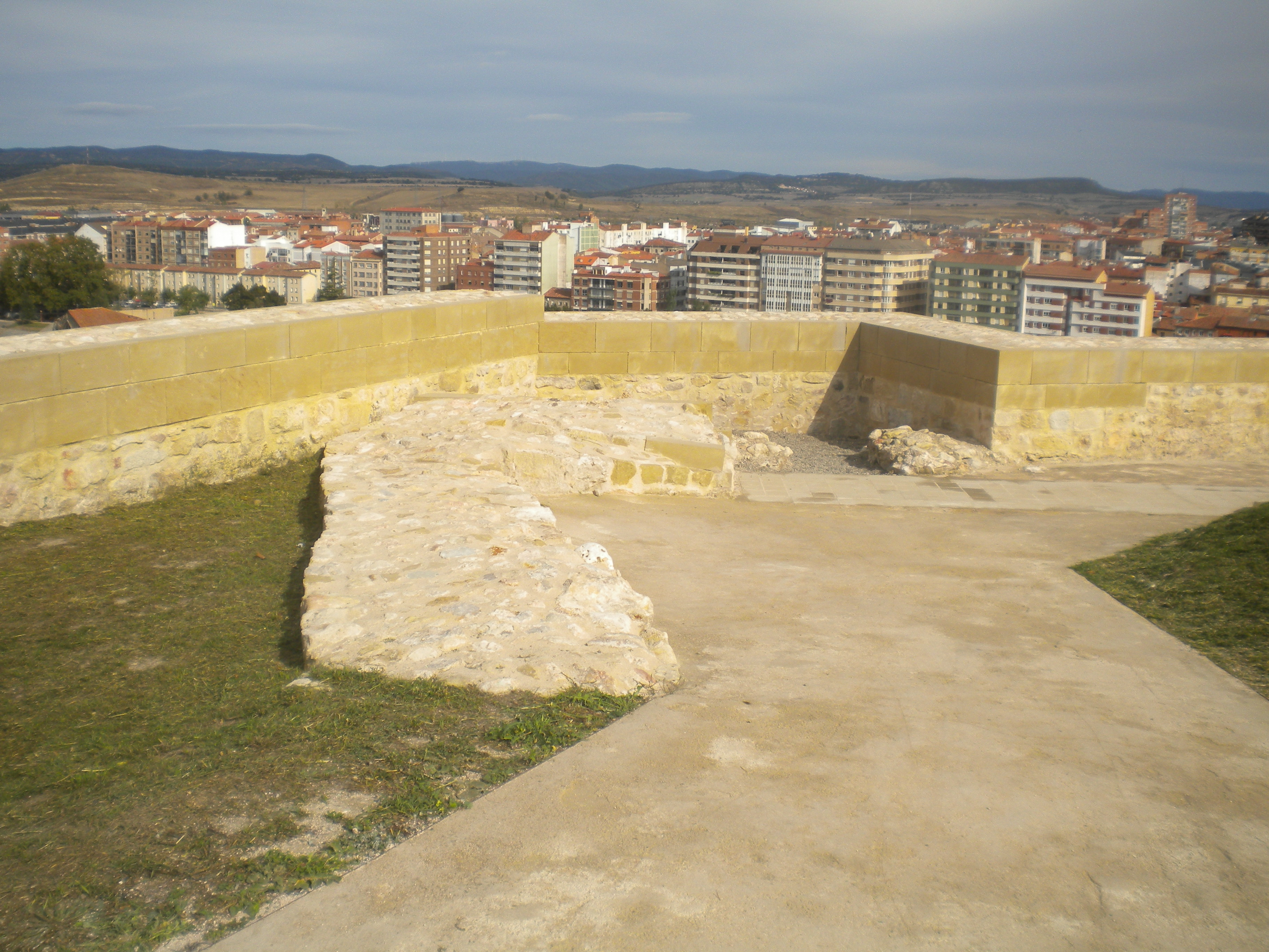 Vista del interior de la Batería de la Reina y rediente antiguo del Castillo de Miranda de Ebro (Castilla y León, España)